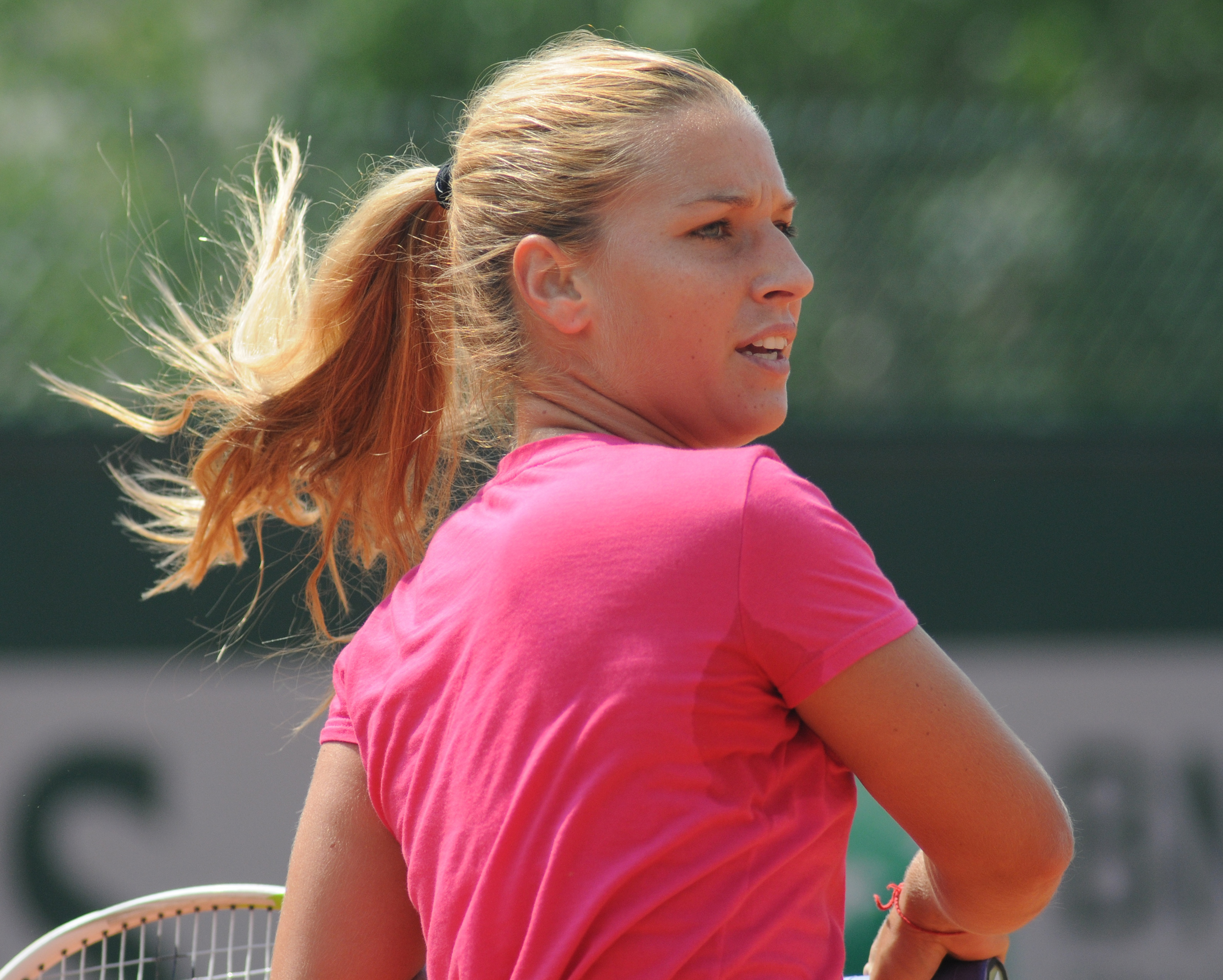 Dominika Cibulkova